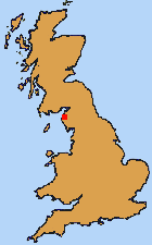 Bibra-Beckfoot